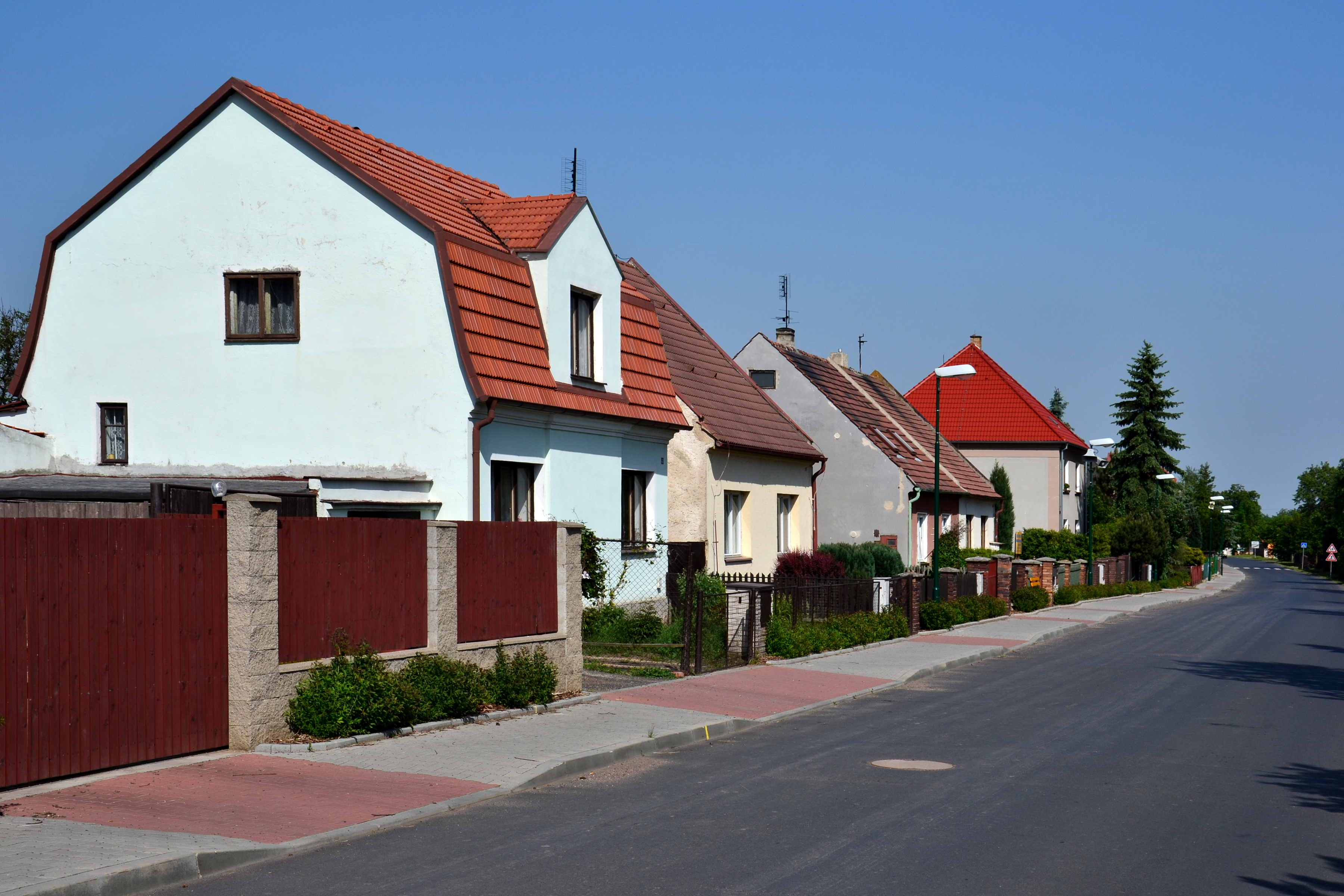 Domy podél silnice z Údlic do Velemyšlevsi